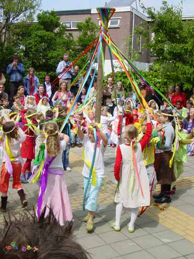 eigen werk vrij voor gebruik bij vermelding bron en maker. Pinksterkroon op een voorjaarsfeest